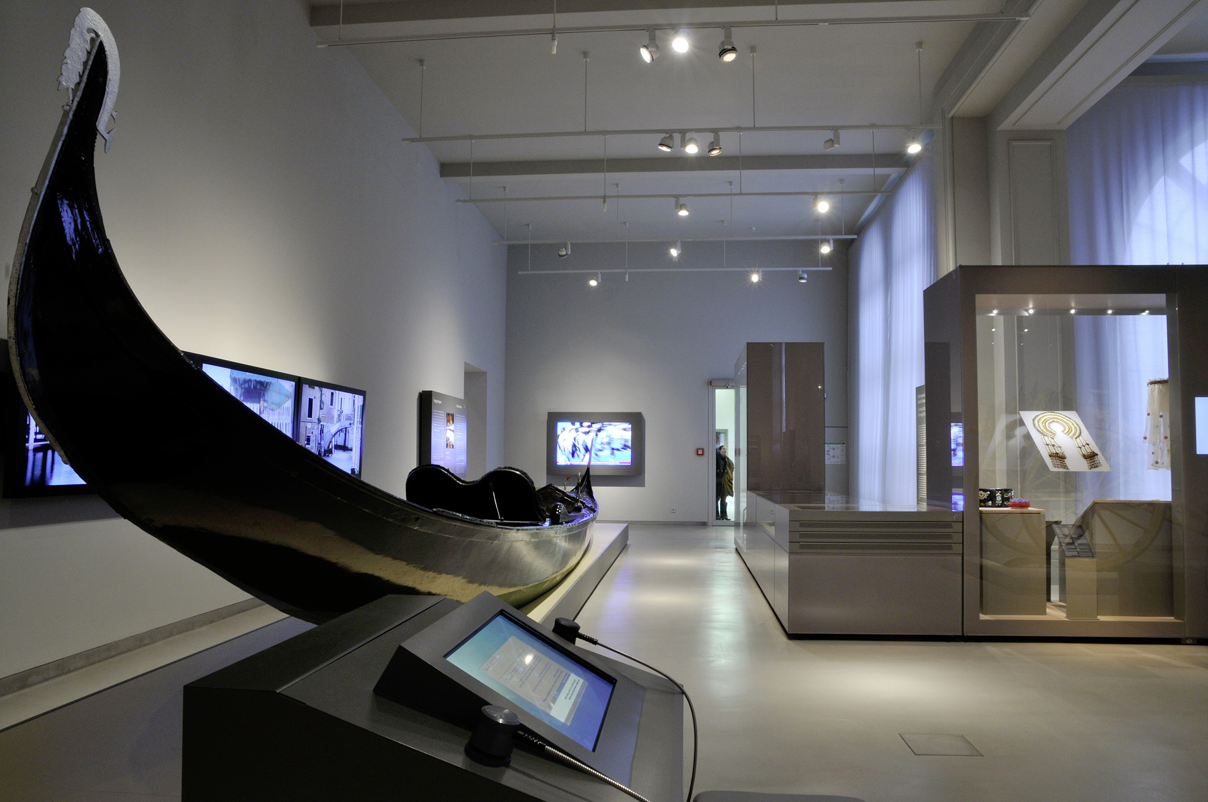 Blick auf die Venezianische Gondel in der neuen Dauerausstellung "Kulturkontakte - Leben in Europa"